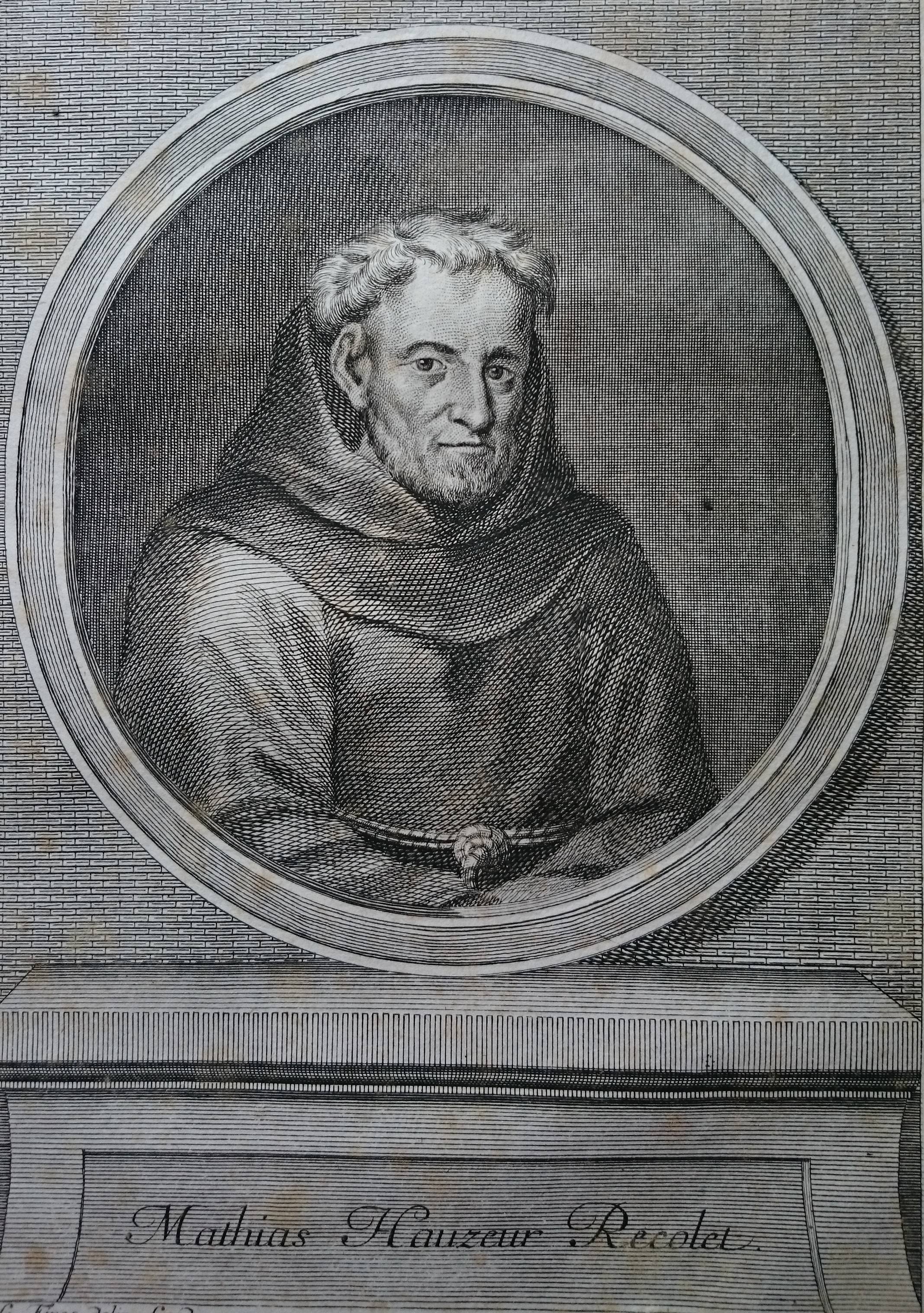 Gravure ancienne du portrait de Mathias Hauzeur Recolet